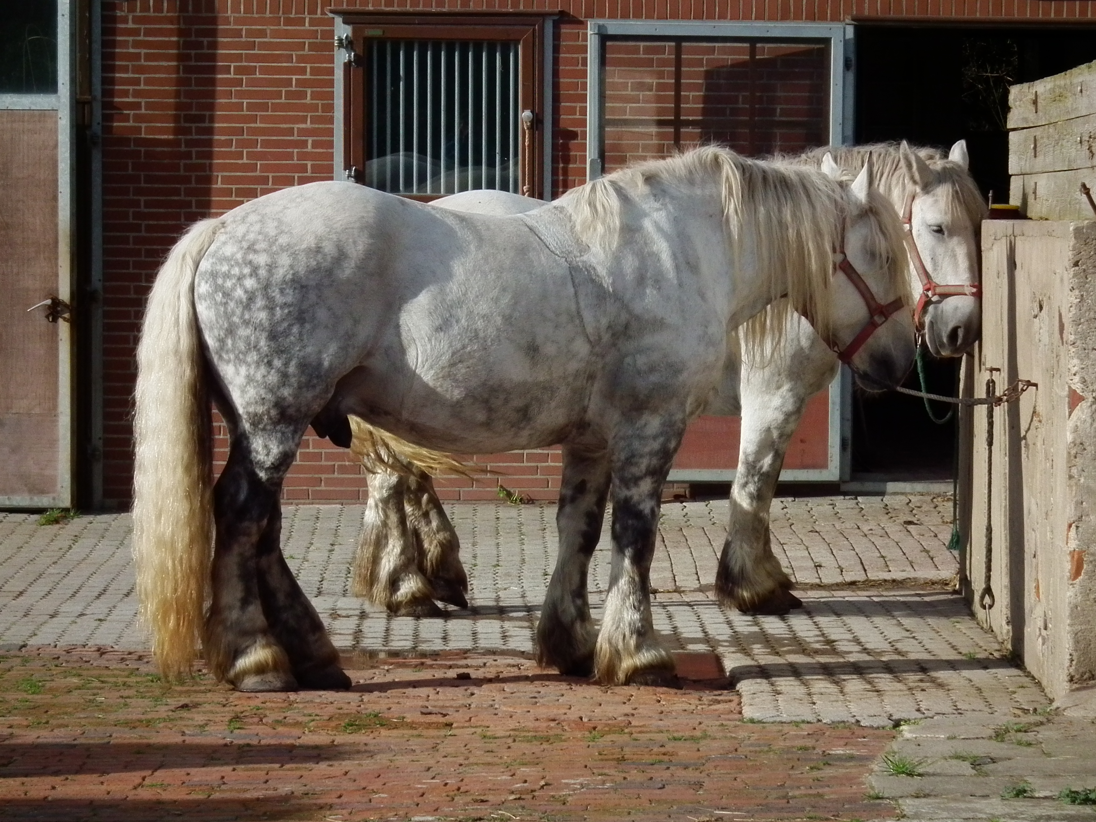 Percheron, fotografiert auf der ostfriesischen Nordseeinsel Juist (Niedersachsen, Deutschland)